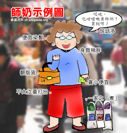 中文（香港）: 師奶示例圖，tonync自行繪畫，以cc-by-2.0發布。背景圖象是旺角街市，原圖File:Mongkok mkt.jpg由Gakmo發布。 「哎吔，乜咁啱呀黃師奶，買餸呀？」是香港話，解作「噯呀，（遇見你）可真巧啊黃師奶，買菜嗎？」。